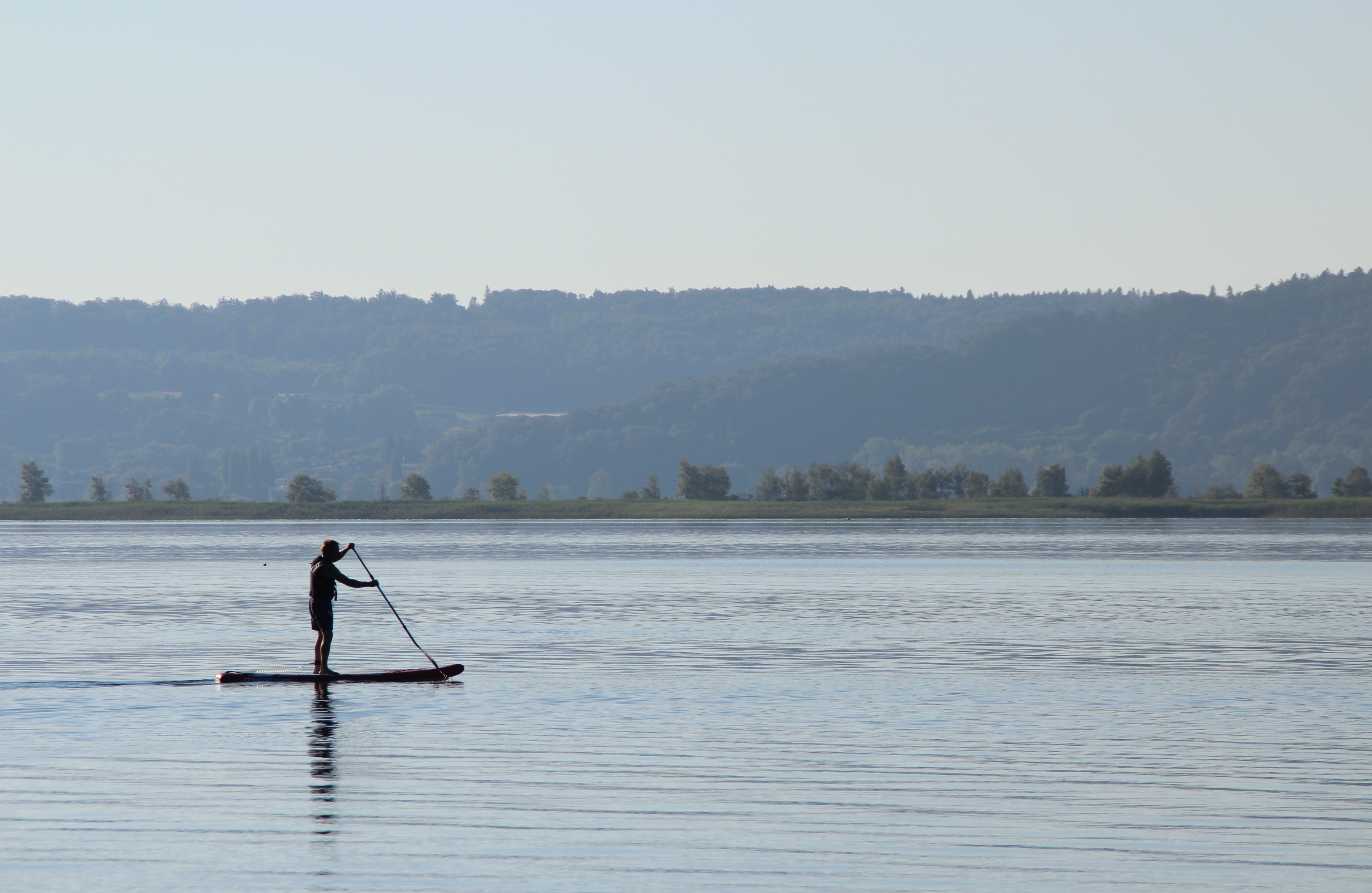 Stand Up Paddling auf dem Bielersee